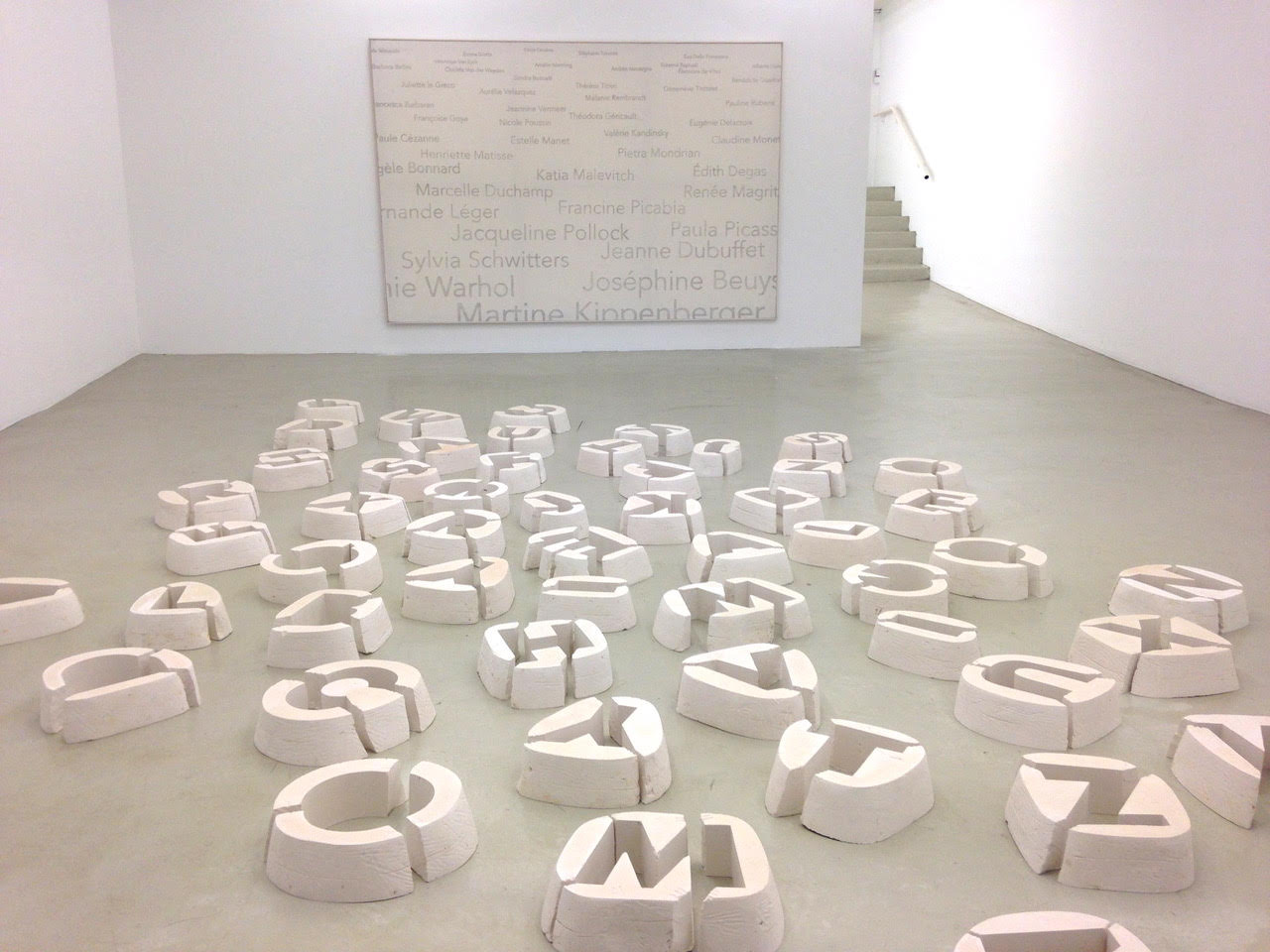 Oeuvre Matrice/Sol